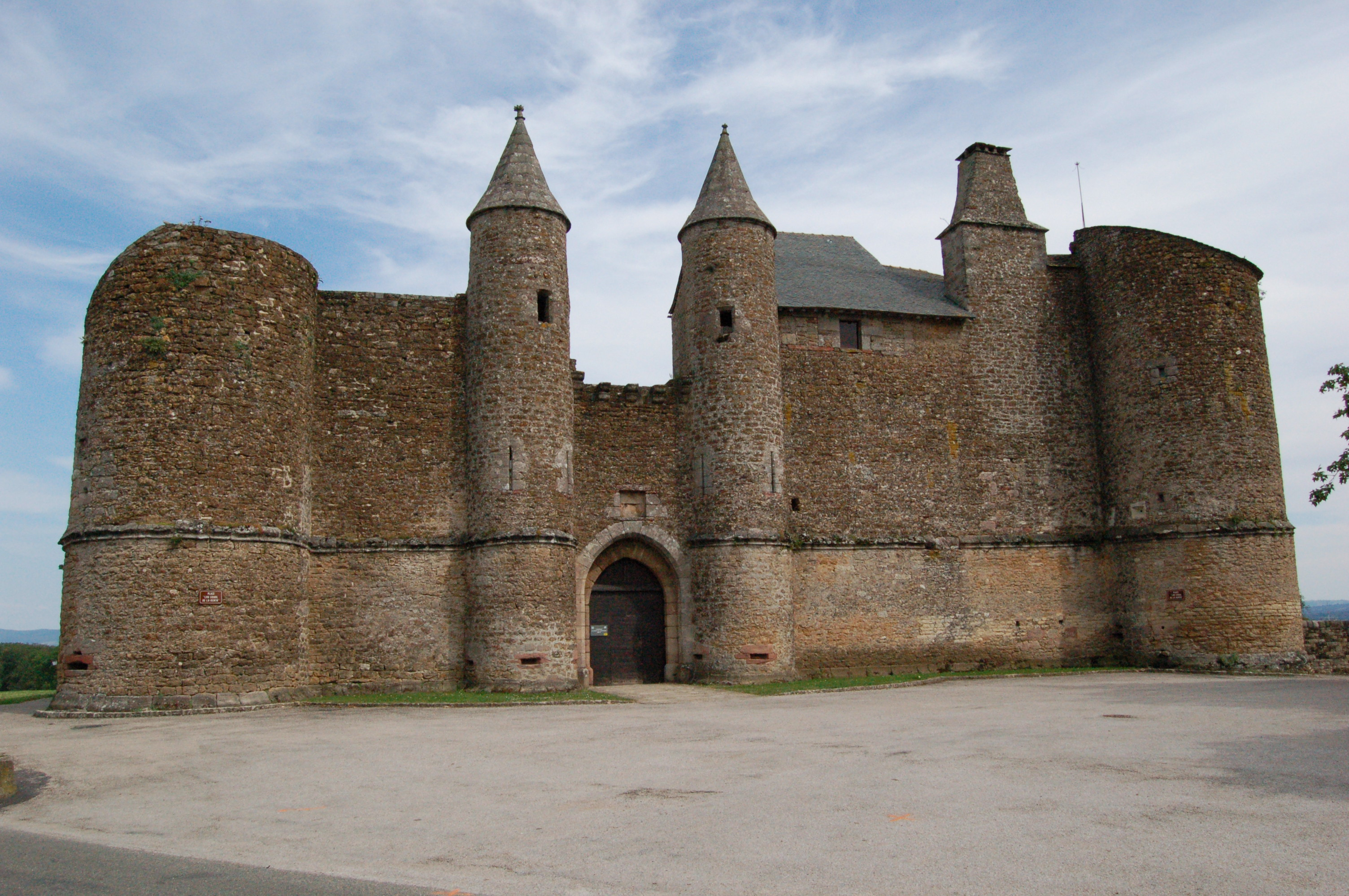 Château d'Onet-le-Château (Aveyron, France).